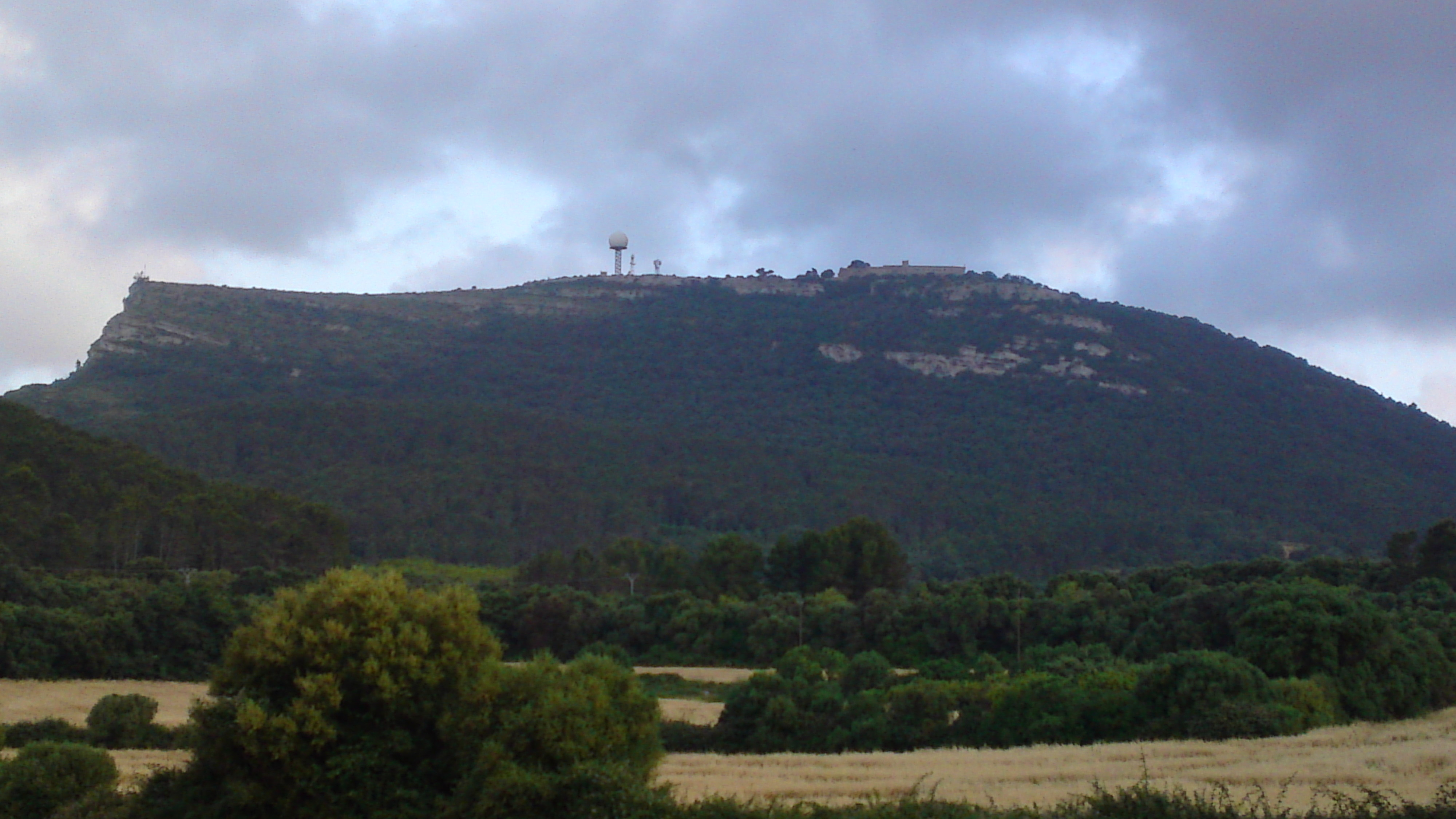 El Puig de Randa des del pinar de les Gatoves